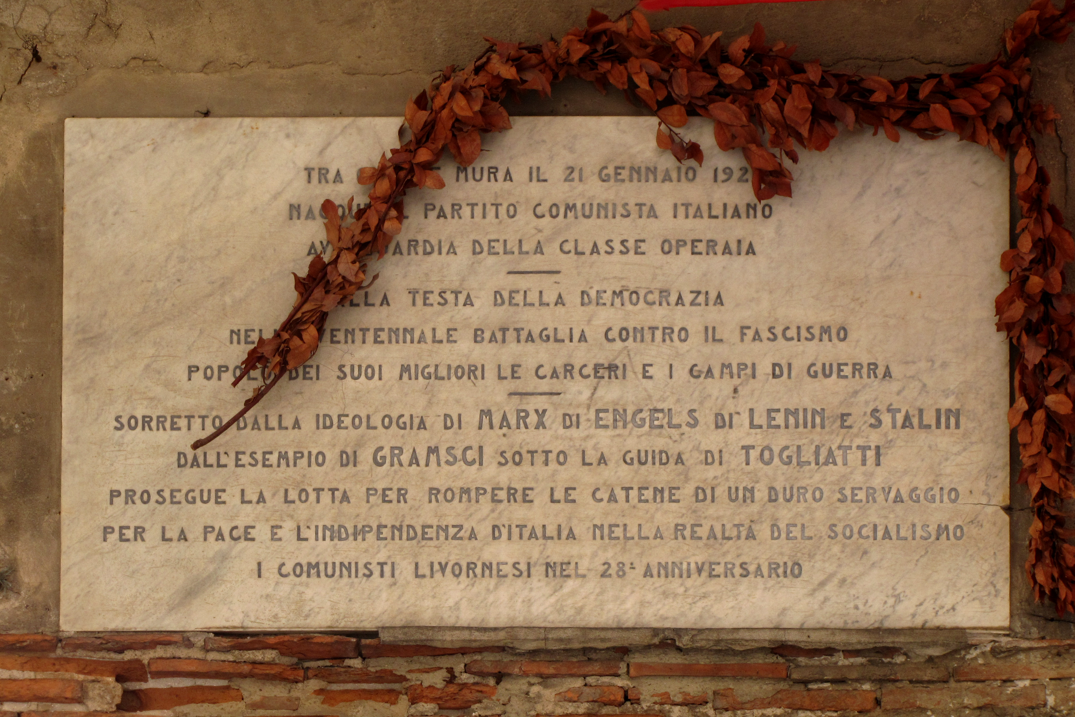 Targa commemorativa della nascita del Partito Comunista Italiano affissa nel 1949 a Livorno presso il teatro San Marco.